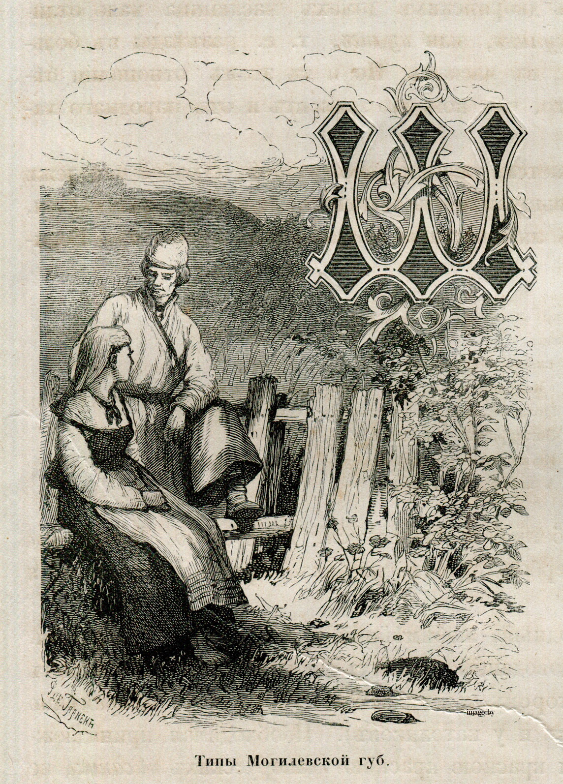 Тэхніка: тарцовы дрэварыт Выдавецтва: Вольф М.О. Гравёр: Ф. де Гарнекъ Год выдання: 1882, Спб Памер выявы: 8.4 х 11.6 см Памер аркуша: 26.5 х 36 см